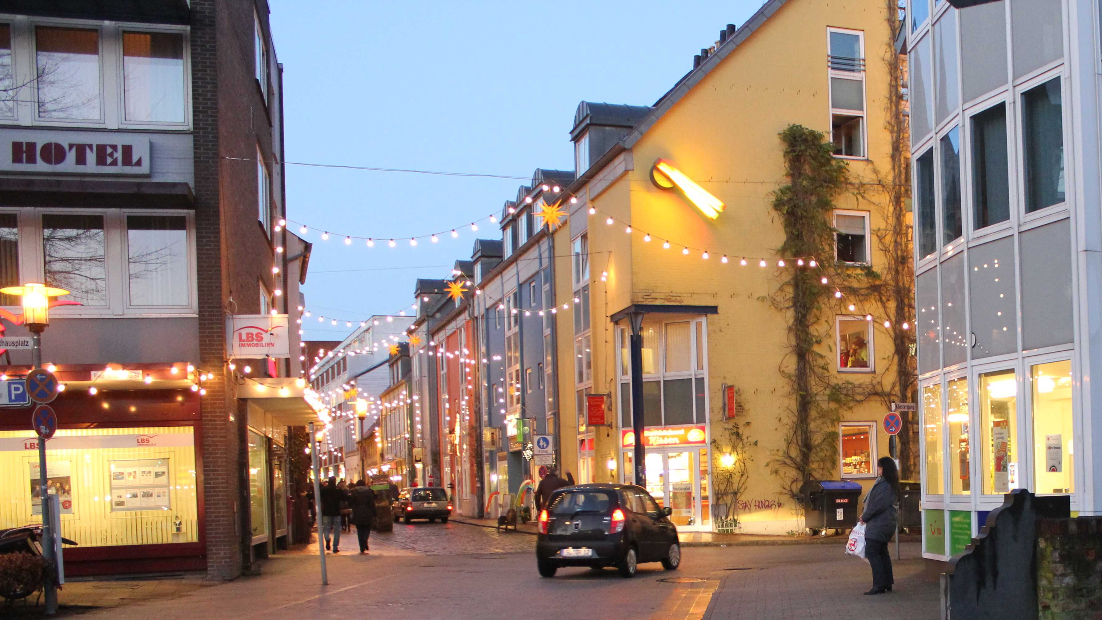 Standort Rotes Tor Flensburgs bei der Roten Straße (Ausschnitt)